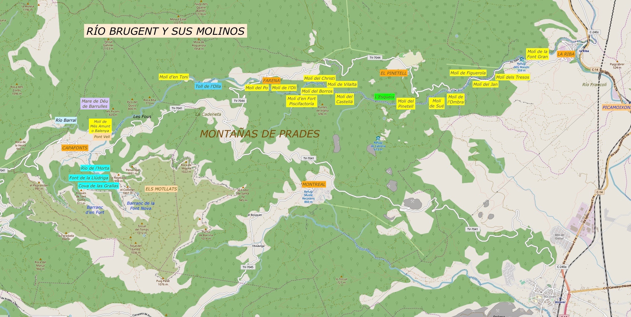 Mapa de los molinos del río Brugent de Tarragona